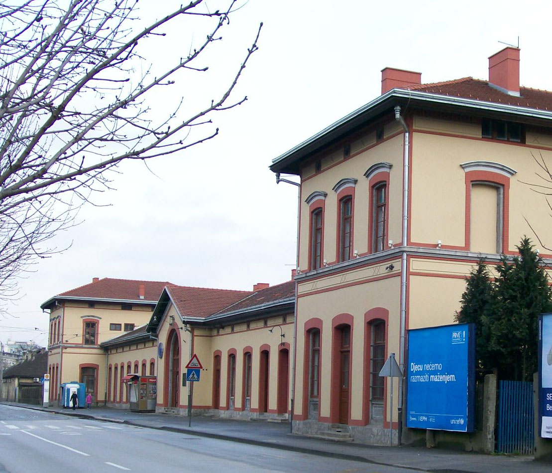 Zapadni kolodovor Zagreb